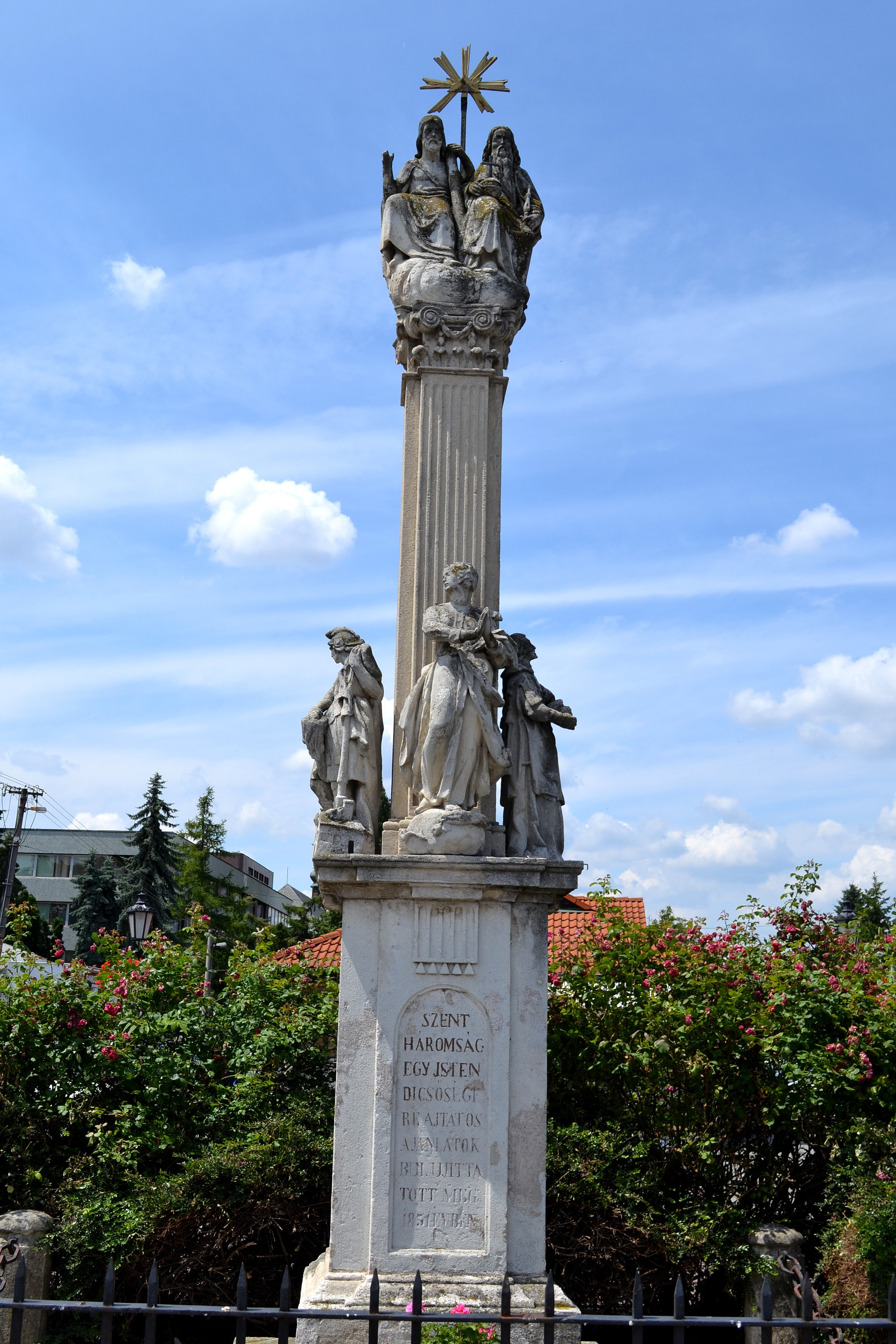 Trojičný stĺp na rovnomennom námestí v Bratislave-Podunajských Biskupiciach